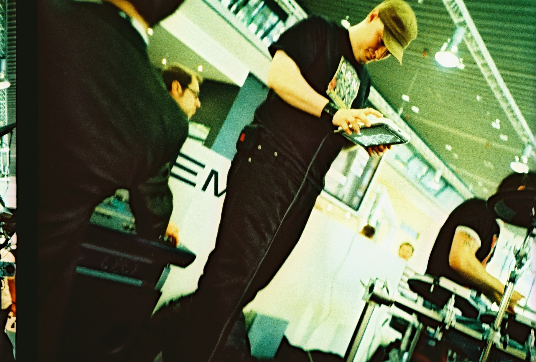 LOMO Frankfurt